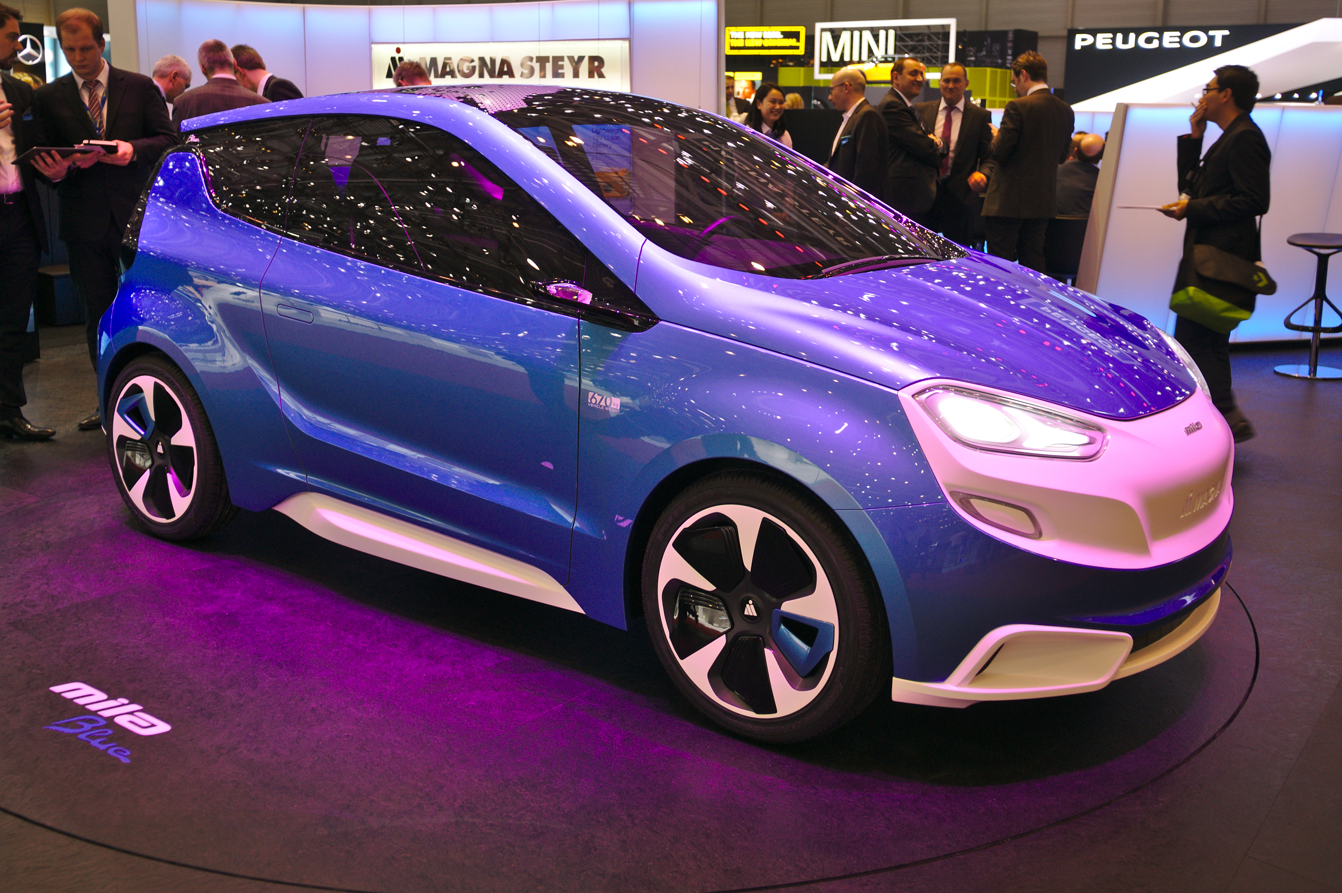 Salon de l'auto de Genève 2014 - 20140305 - Mila Blue